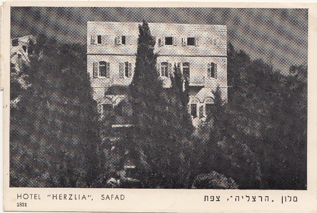 Hotel "Hertzliya" Safad